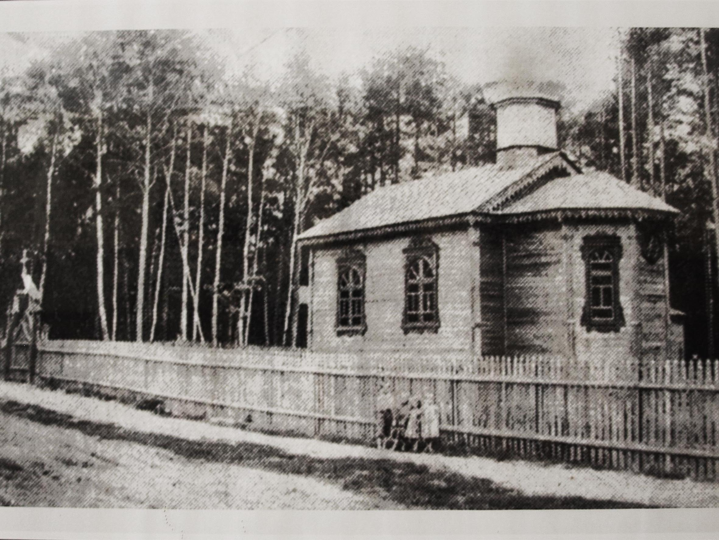 Церква у Ворзелі. Зруйнована більшовиками